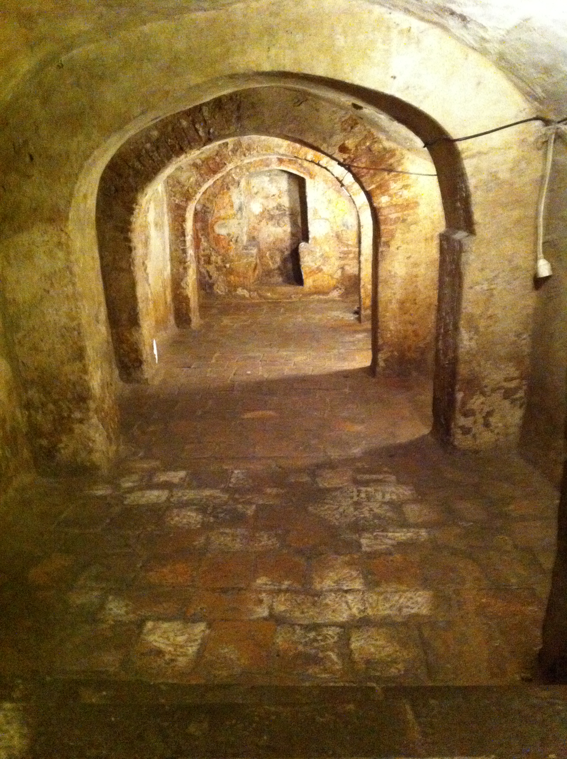 Cueva de la casa natal en Almodóvar del Campo, lugar de reflexión del joven Juan de Ávila